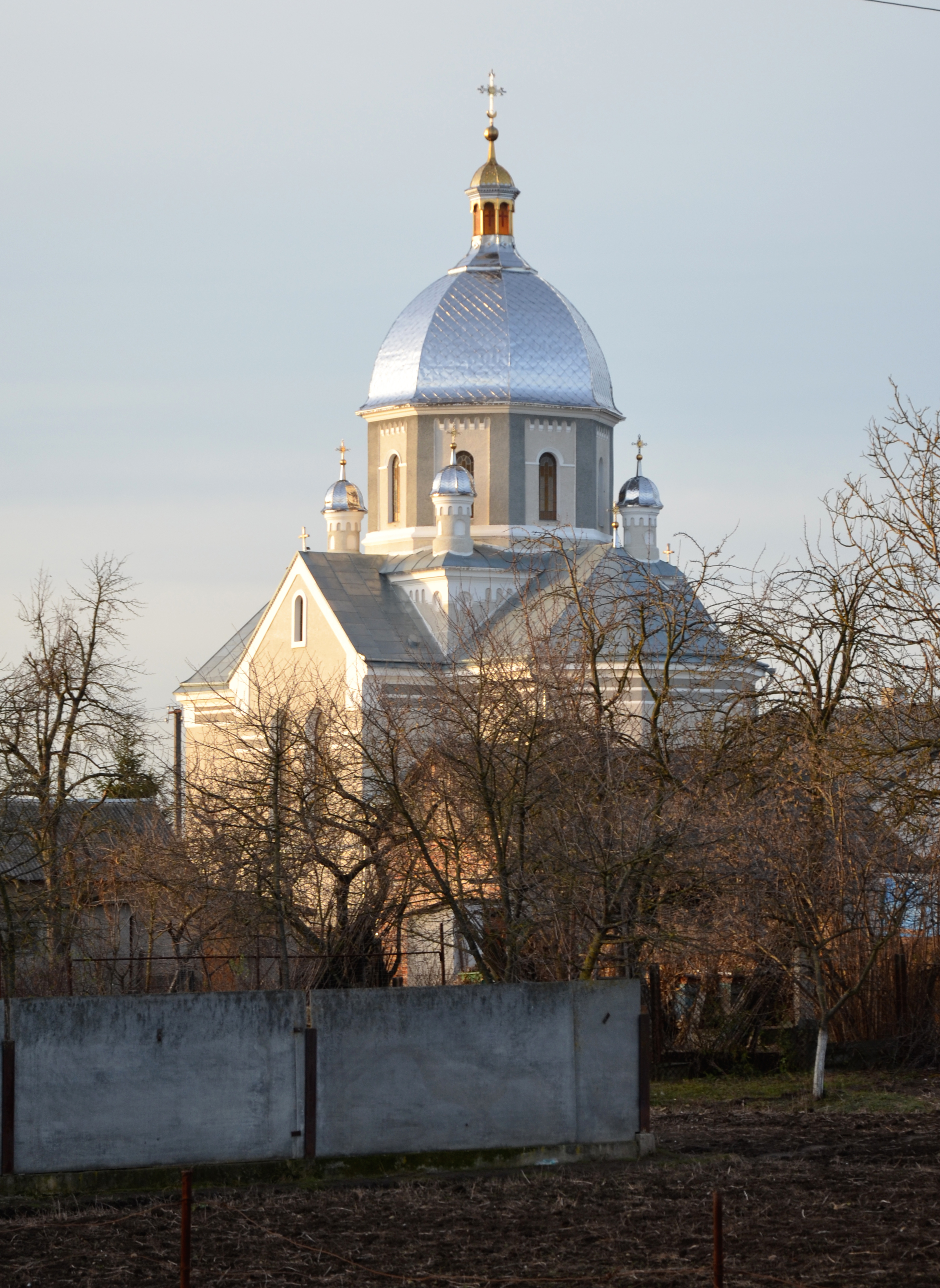 Церква в селі Кукезів Кам'янка-Бузького району.